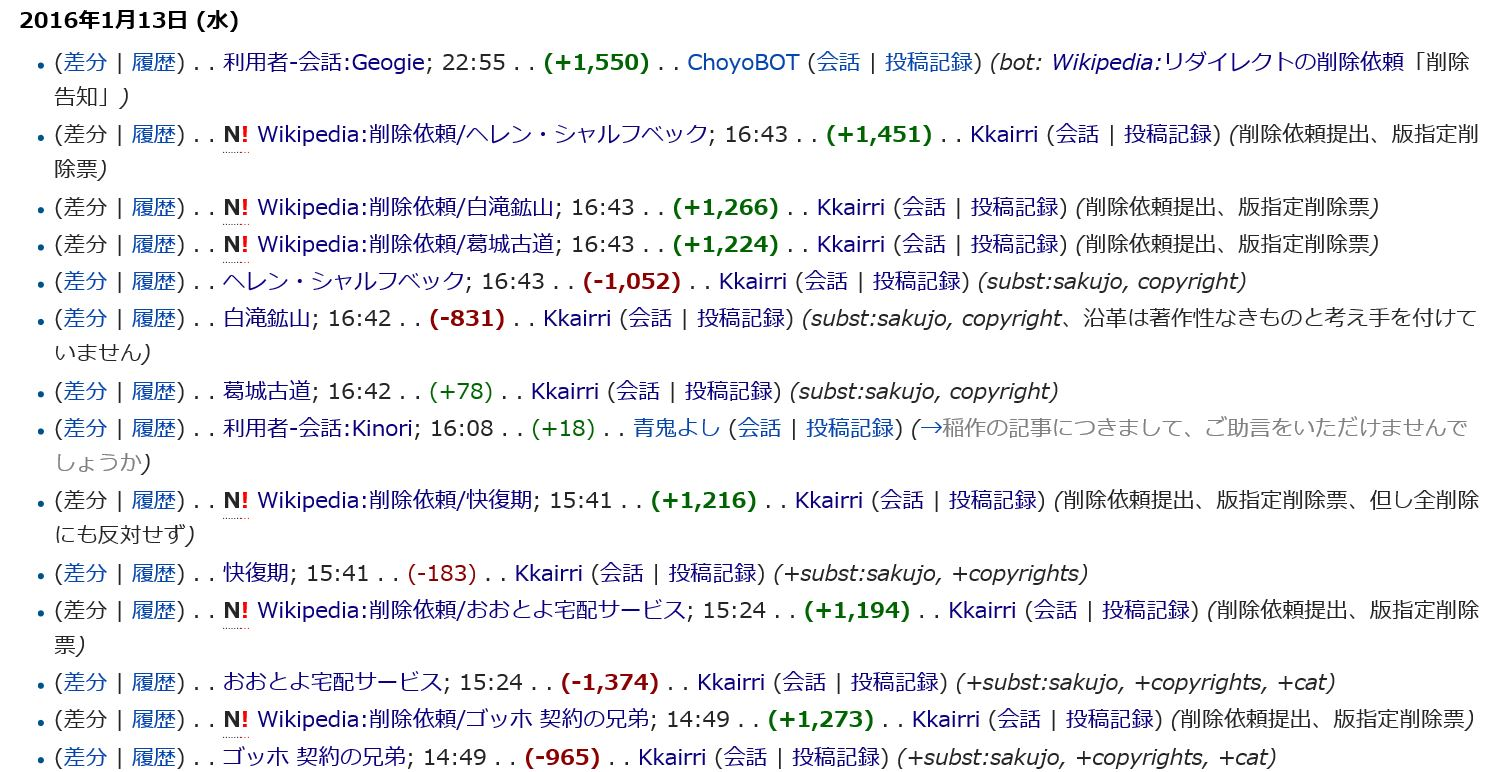 削除依頼の例